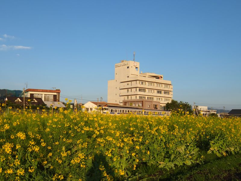 JR二月田駅に停車する指宿枕崎線普通列車 2017年2月25日撮影